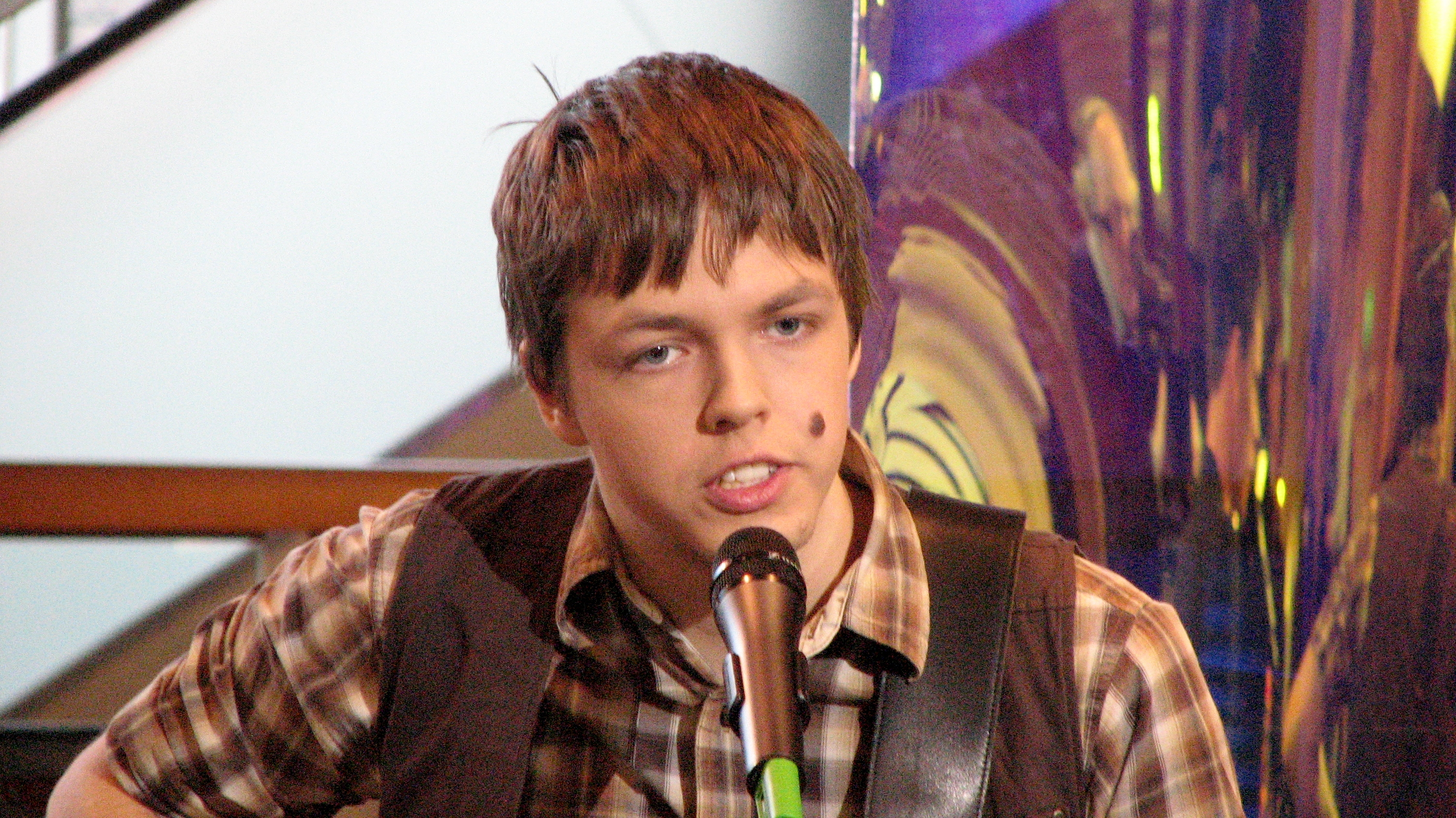 Rain Parve esinemas ansambliga Tenfold Rabbit Ringvaate Eesti Laulu salvestusel